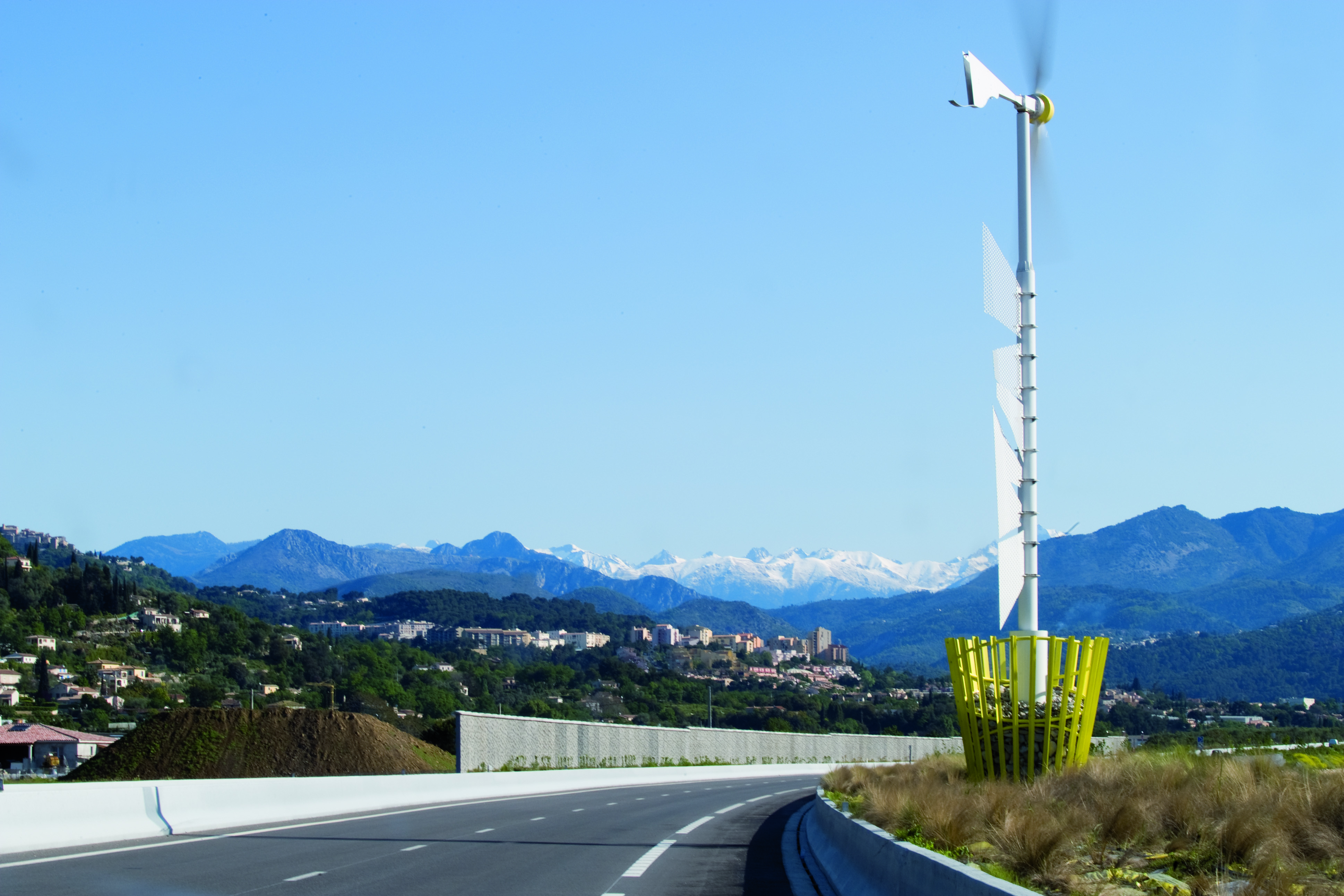 Eolienne (RD6202bis, Vallée du Var)